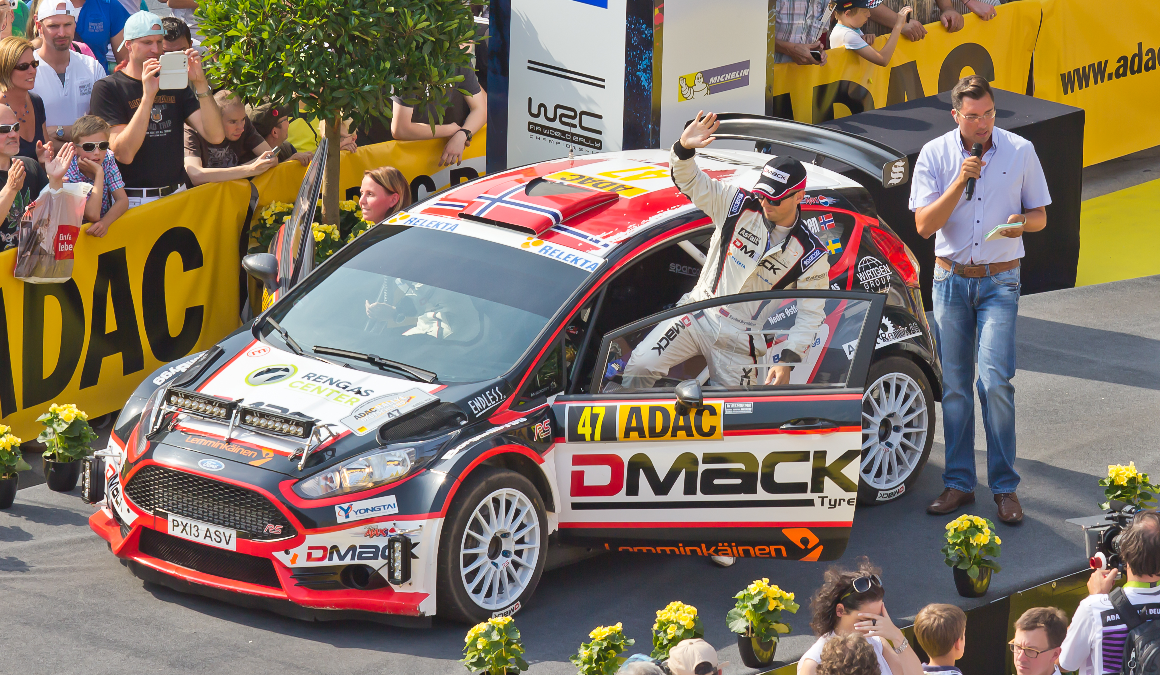 ADAC Rallye Deutschland 2013 - Fahrerpräsentation auf dem Roncalliplatz: Team DMack-Autotek mit Fahrer Eyvind Brynildsen und und Co-Fahrerin Maria Andersson im Ford Fiesta R5